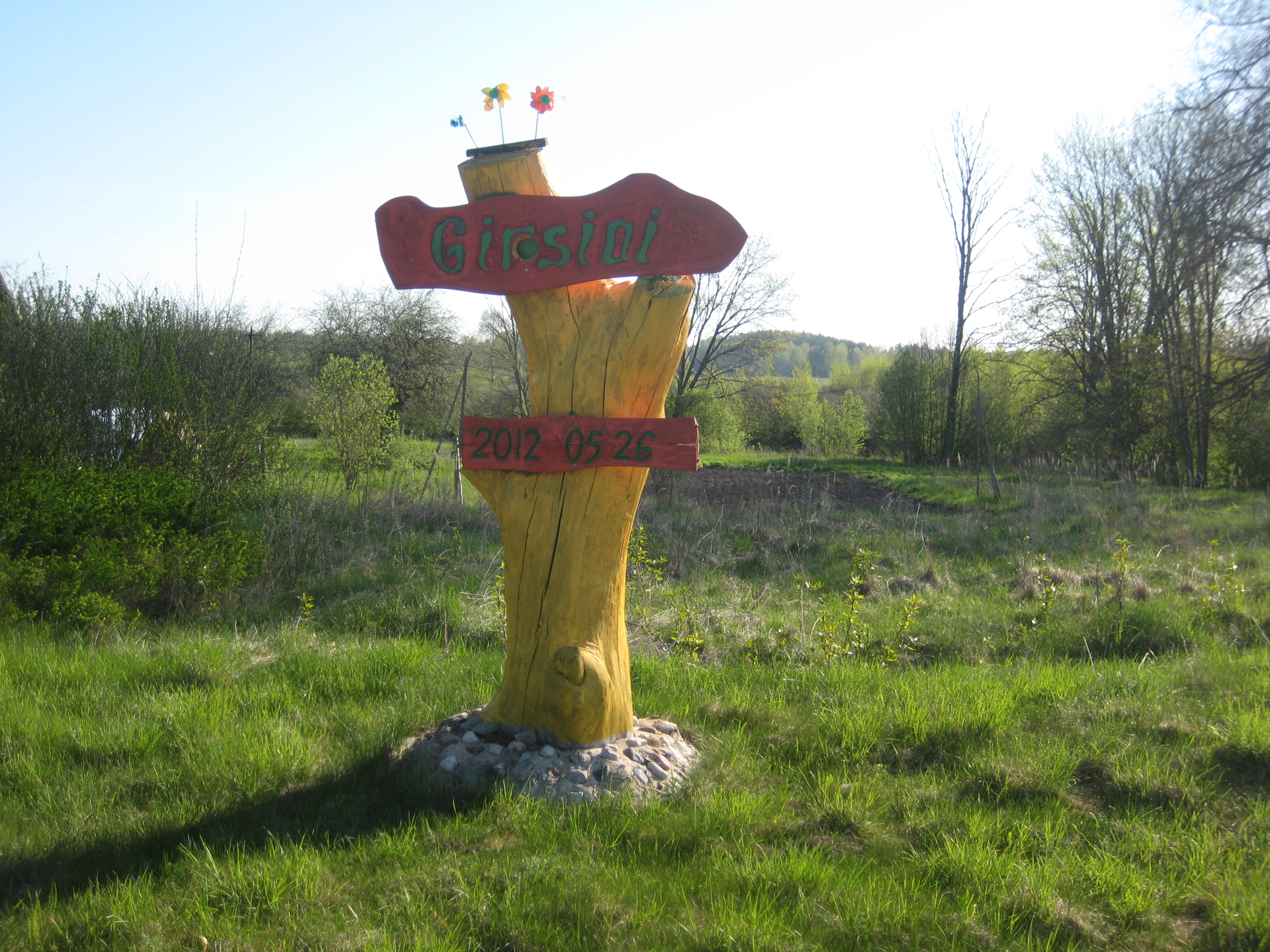 Zarasų sen., Lithuania